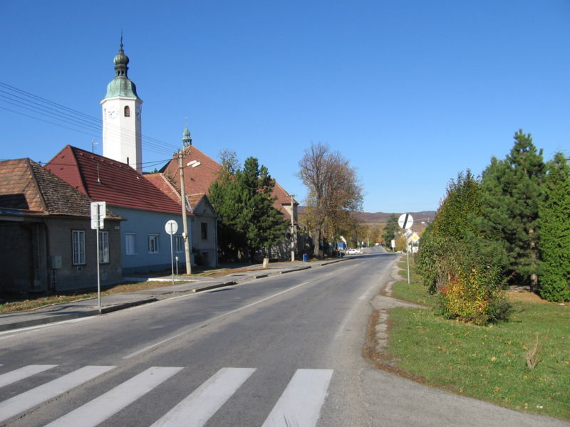 Častá, Slovakia, main street